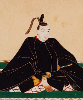 池田継政（第7代岡山城主）、Ikeda Tsugumasa(the 7th Okayama castellan)